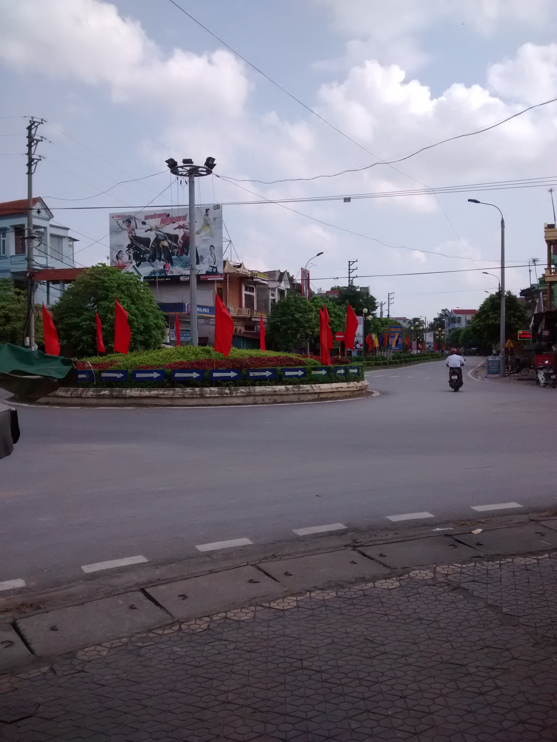 Vòng xoay trung tâm thị trấn Sông Thao